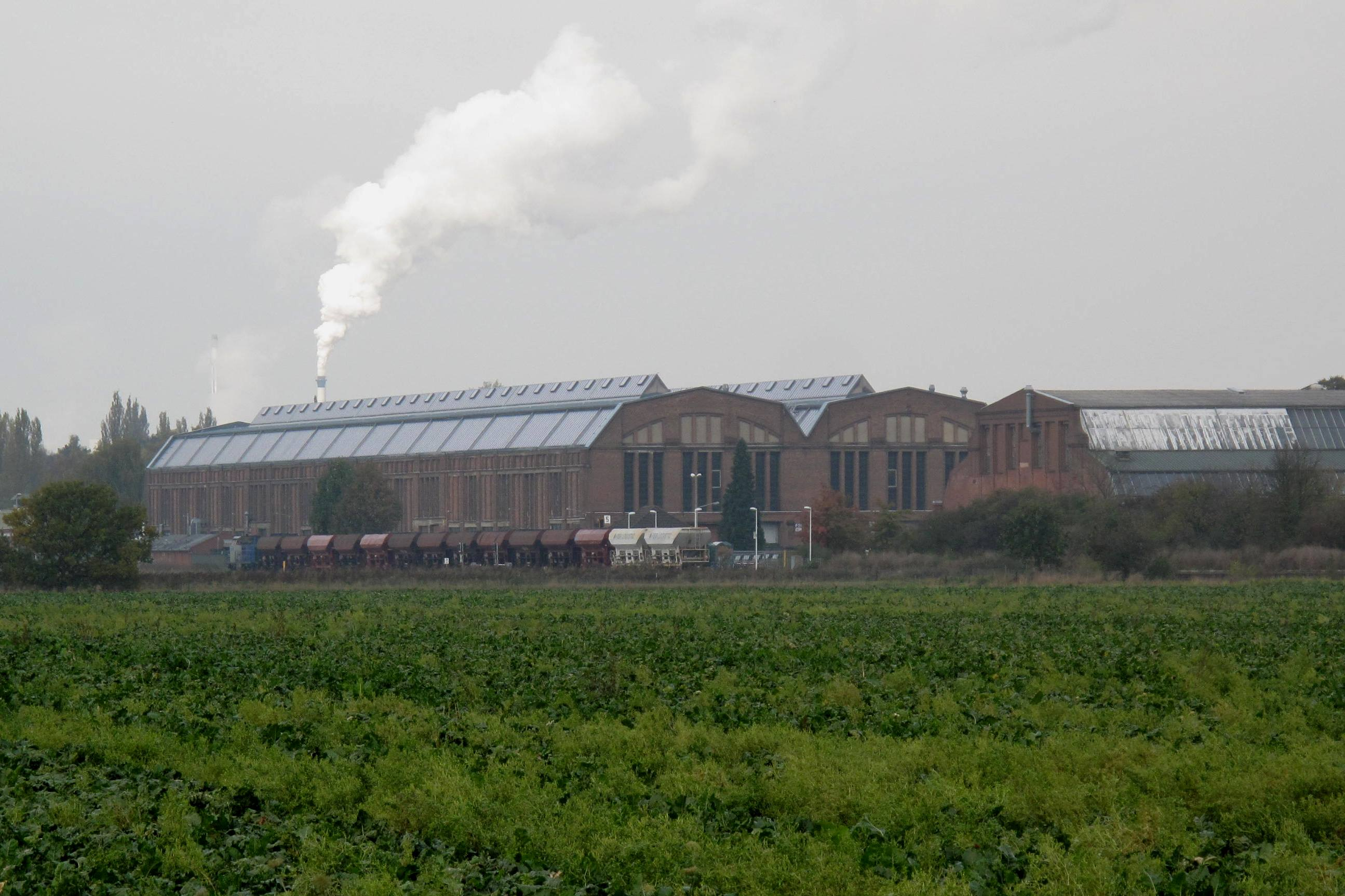 Rurtalbahn-Diesellok V 107 mit Kohlezug von Düren zur Zuckerfabrik Jülich passiert das frühere Bundesbahn-Ausbesserungswerk Jülich-Süd (heute Bundeswehr-Instandsetzungswerk und Bahn-Haltepunkt Forschungszentrum), 22. Oktober 2009. (14 Fc-Wagen = 135 m.) Der Schornstein im Hintergrund gehört nicht zum AW, sondern zur ca. 1 km dahinter liegenden Zuckerfabrik.